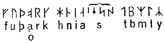 норвежские руны. сайт Арильда Хауге